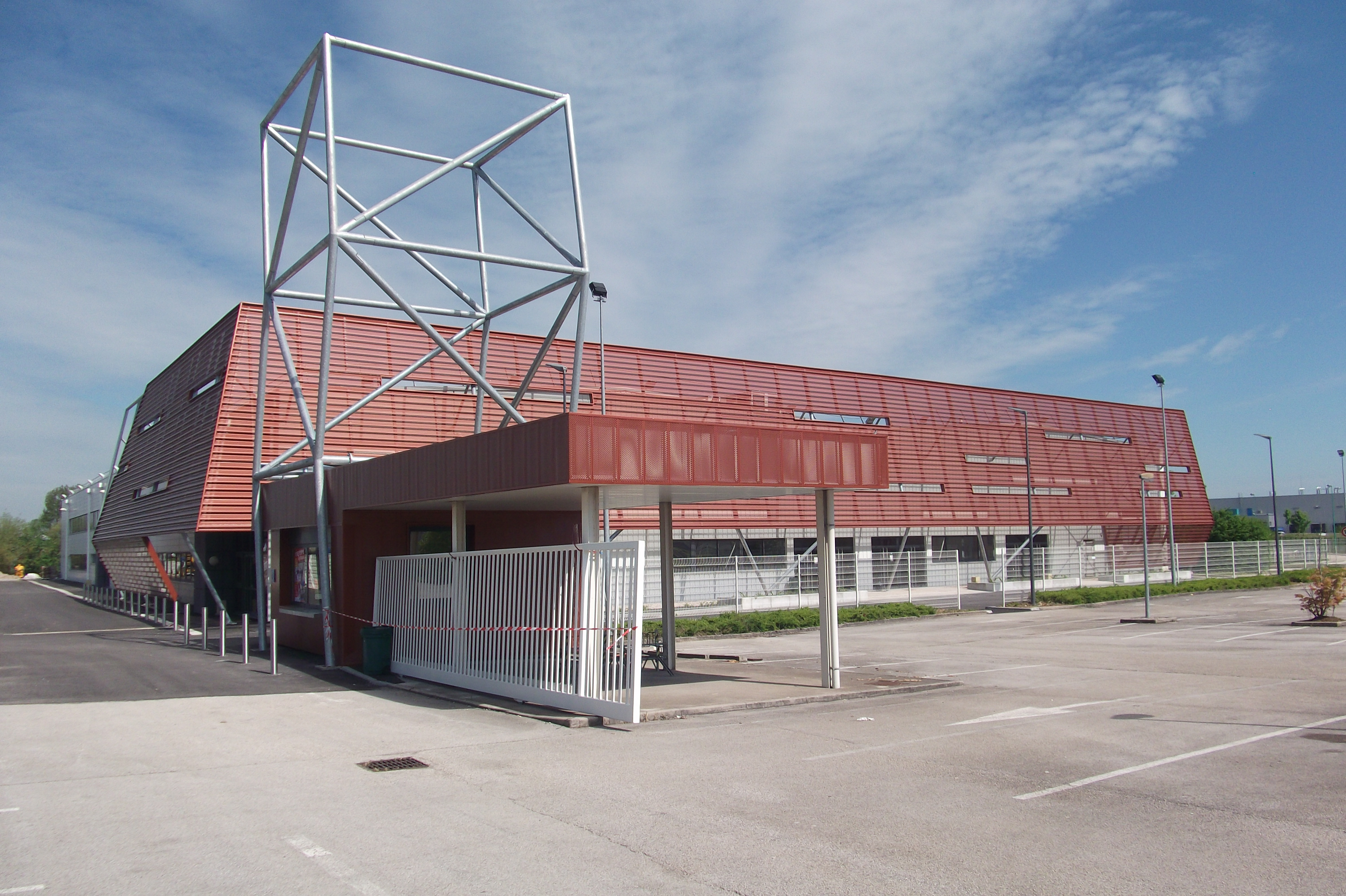 Le parc des expositions de Vesoul (Haute-Saône, Franche-Comté)